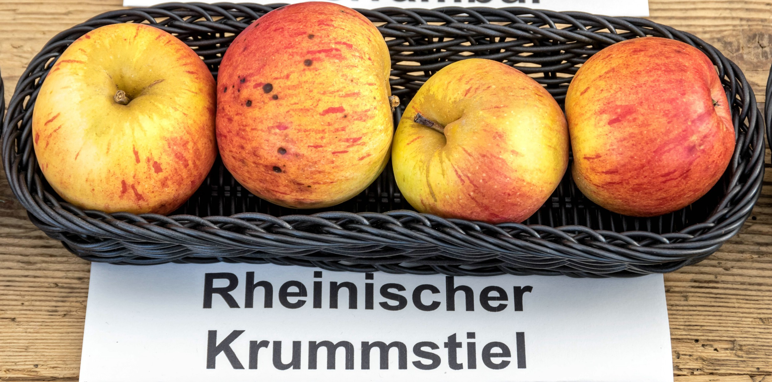 Alte Apfelsorten, von denen es im Badischen noch tragende Bäume gibt. Alle Aufnahmen au dem Oktober 2015